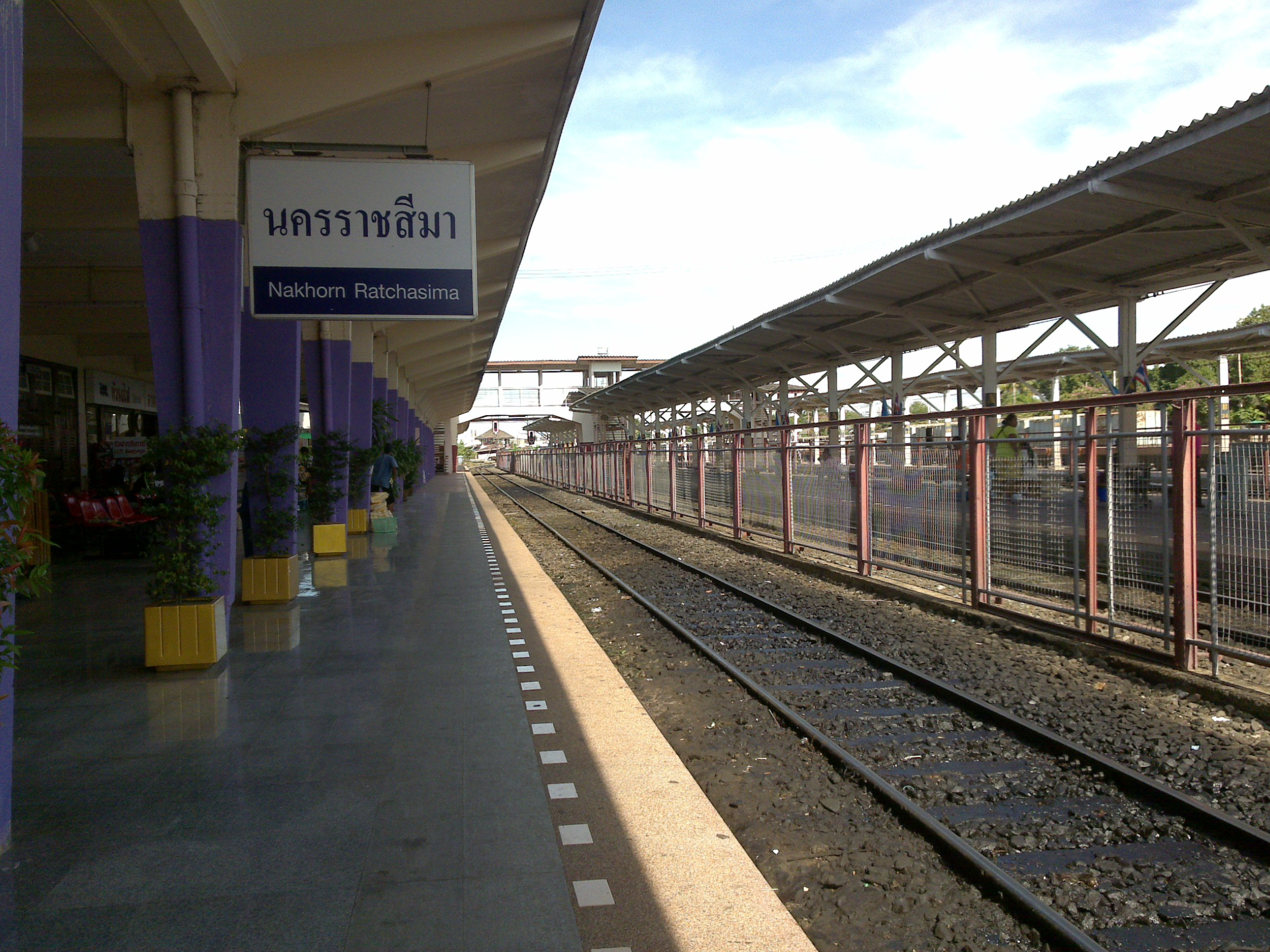 สถานีรถไฟนครราชสีมา